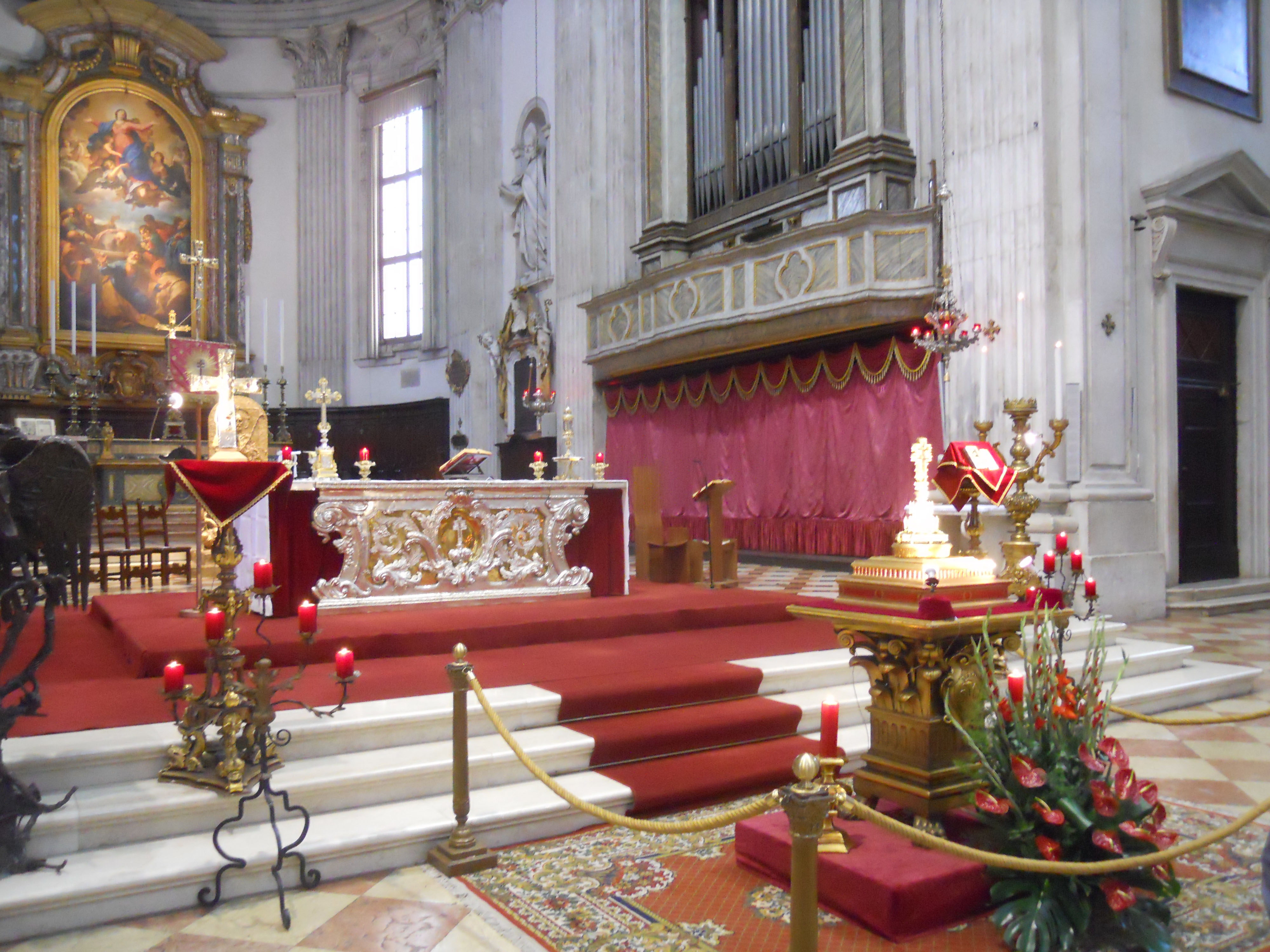 Tesoro delle Sante Croci (esposizione settembre 2011)